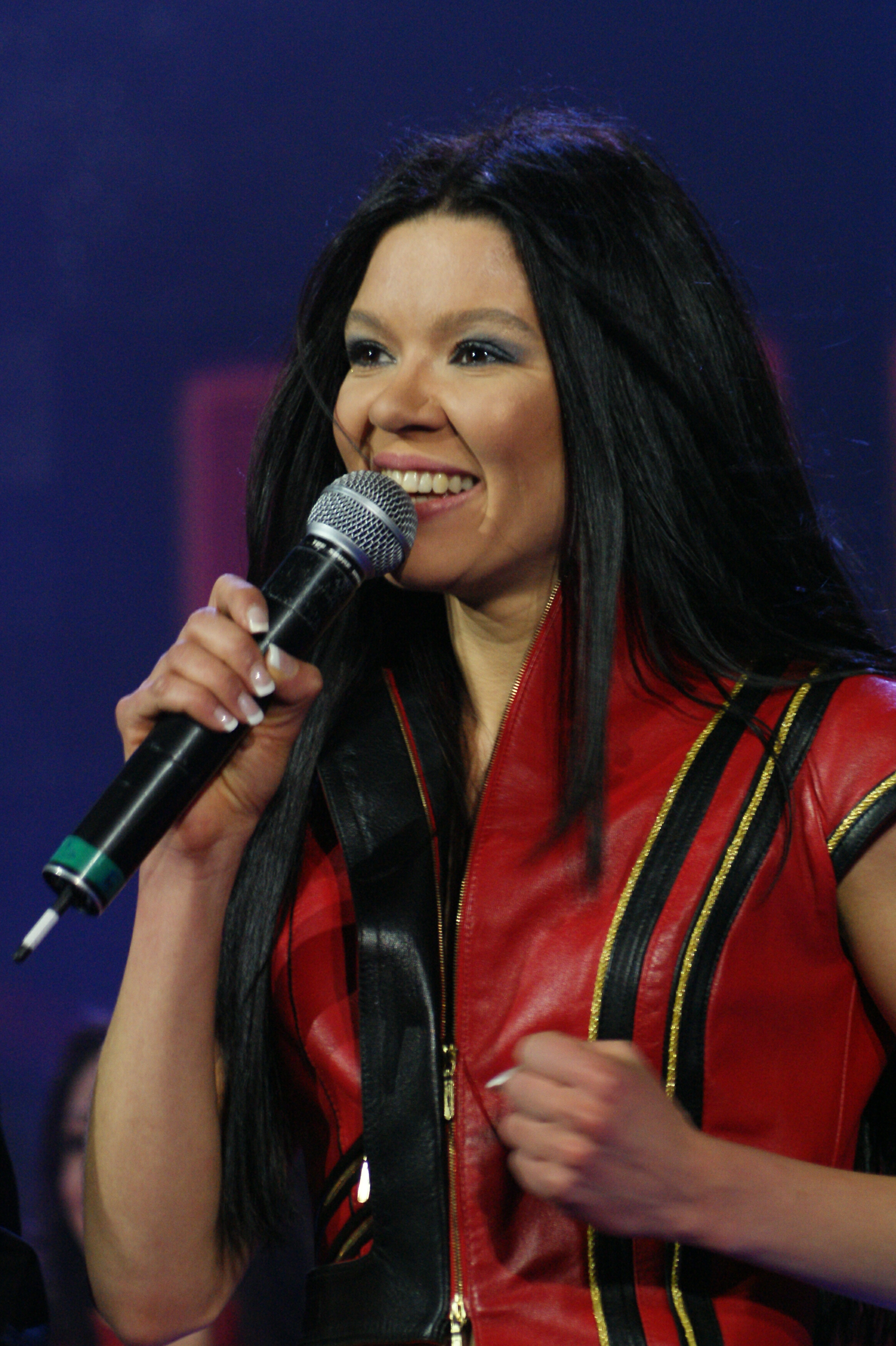 Ruslana